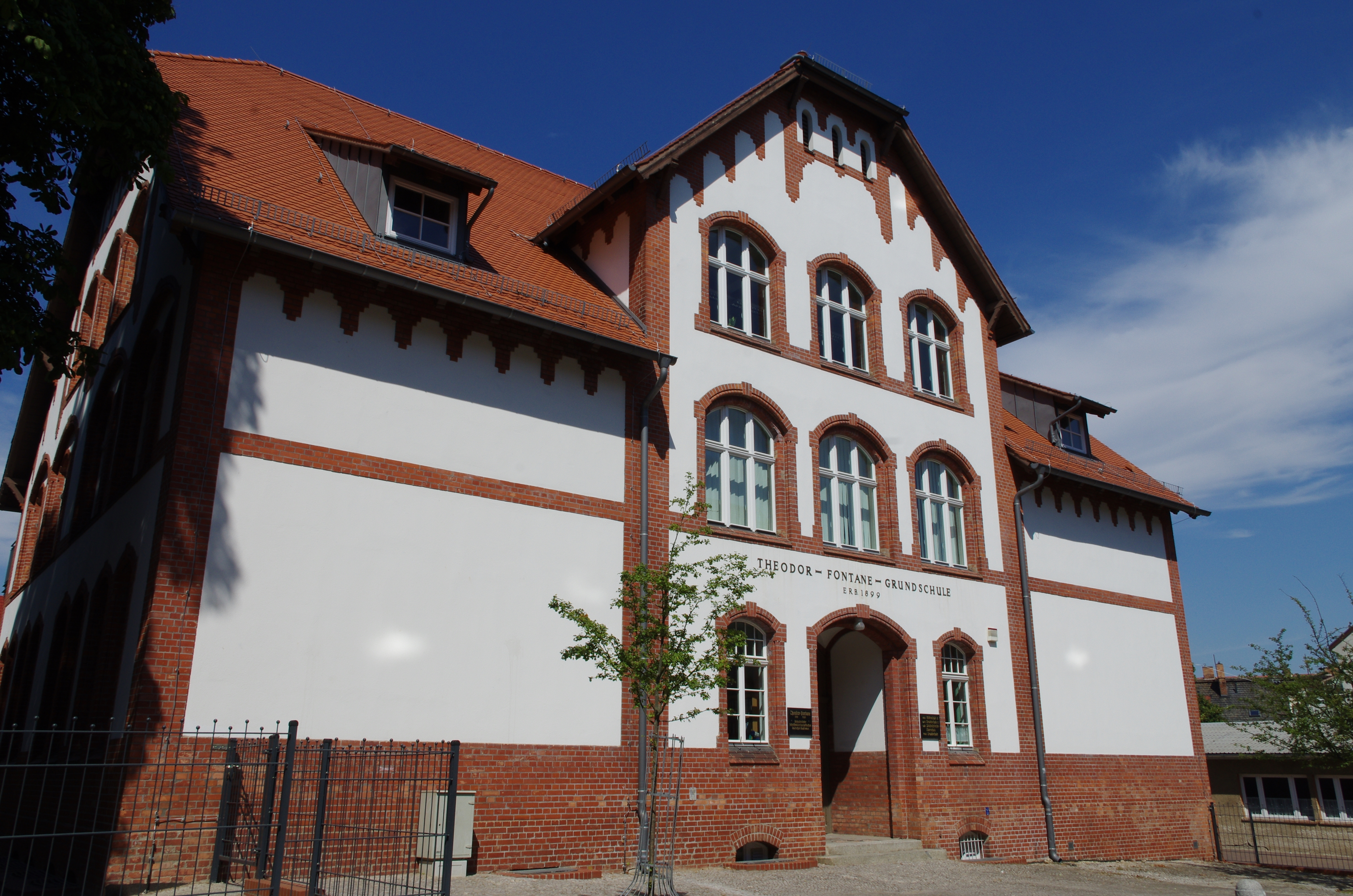 Bad Freienwalde (Oder) in Brandenburg. Die Schule in der Straße Lensingenstraße 15 steht unter Denkmalschutz.